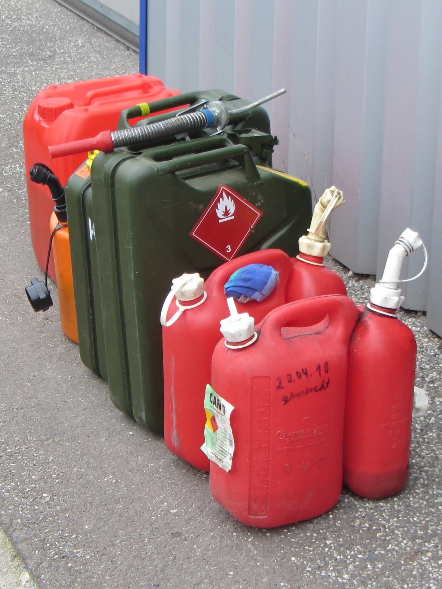 mehrere Kanisterformen. Von vorne beginnend: 2x 2-Kammer Kombikanister, 2x klassische 20l Kanister aus Stahlblech, ein weiterer 2-Kammer Kombikanister in anderer Bauart und eine weitere Kanisterbauart.